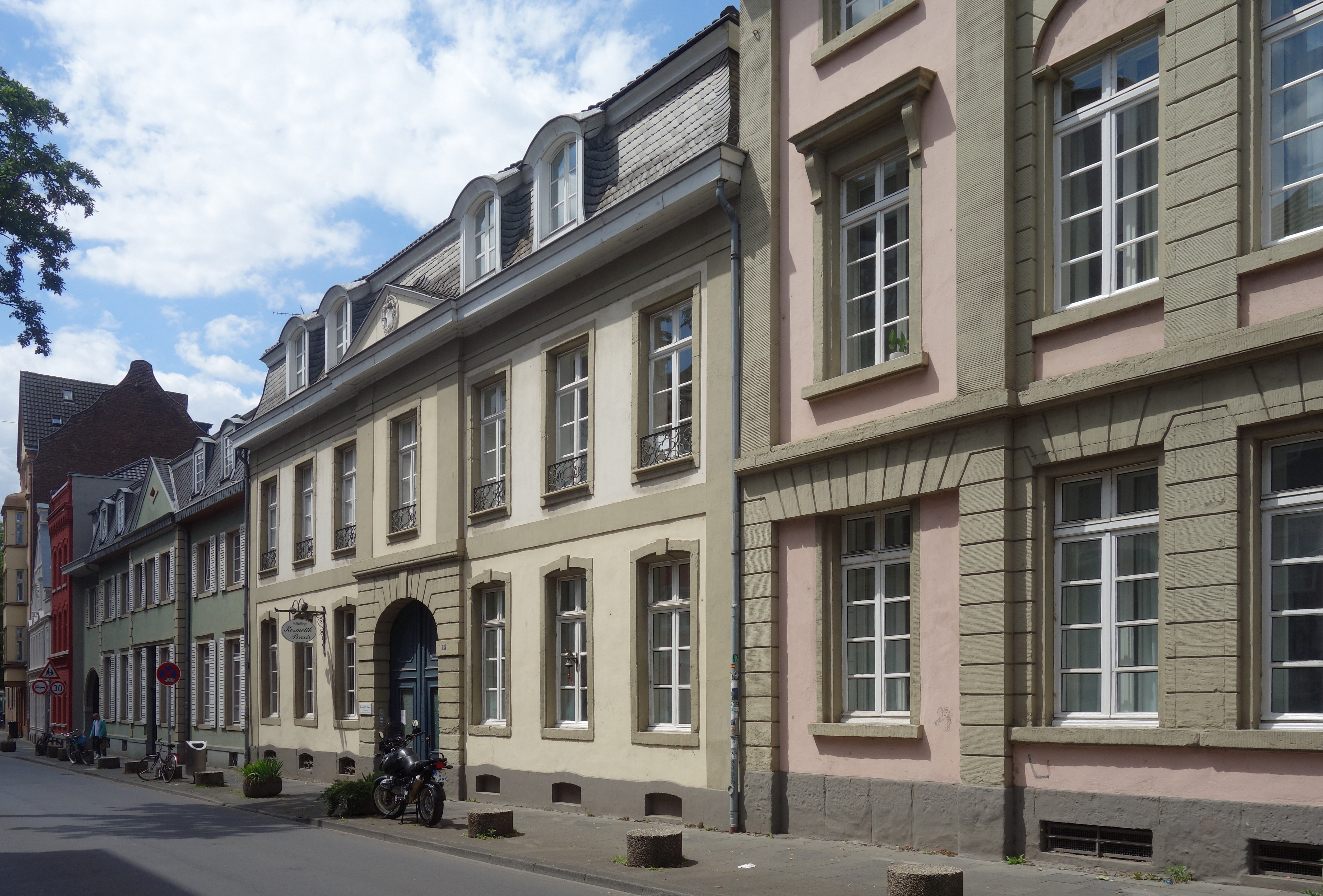 Historische Häuserzeile an der Mülheimer Freiheit in Köln-Mülheim